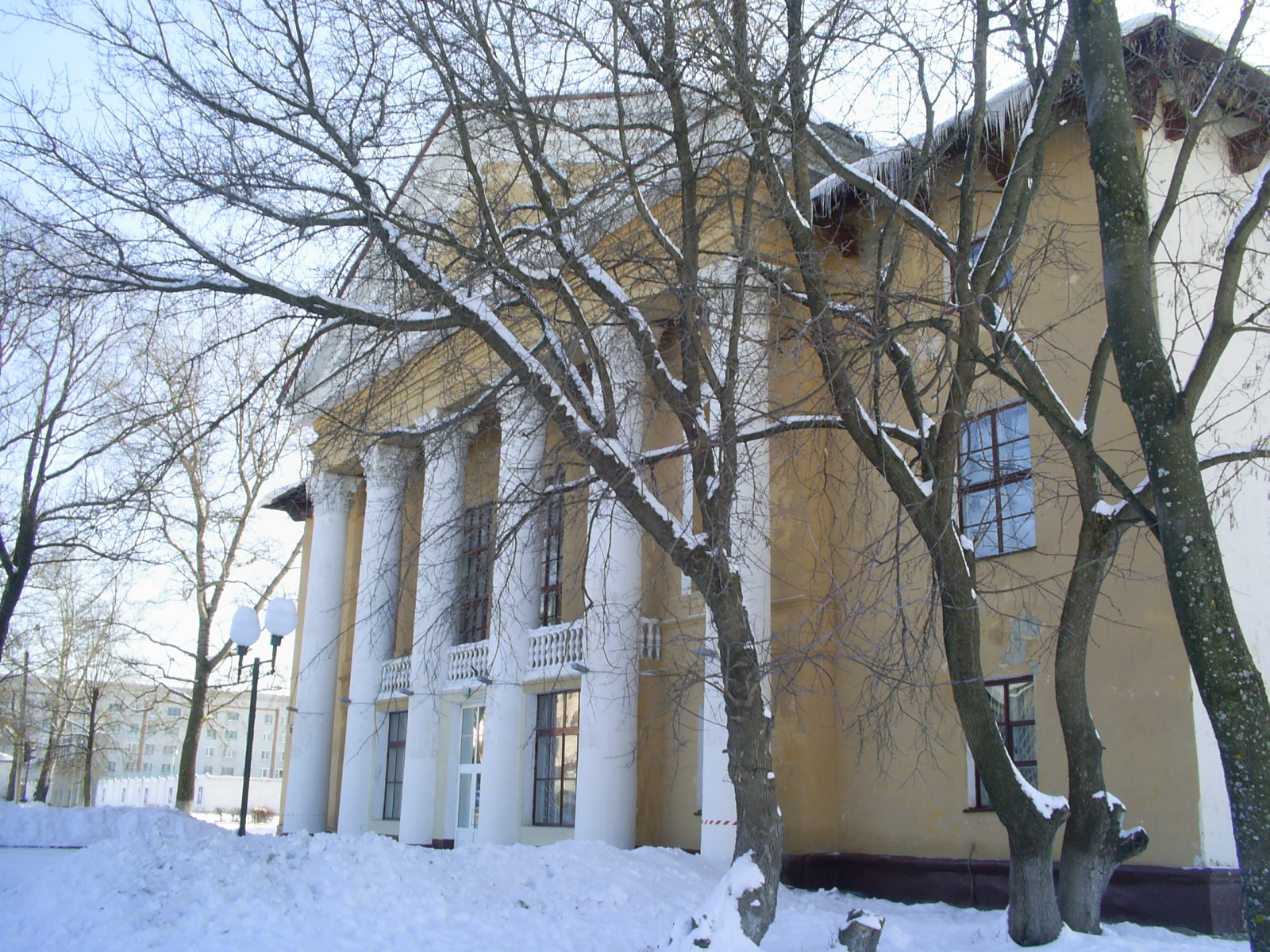 Дом детского творчества города Шумерля